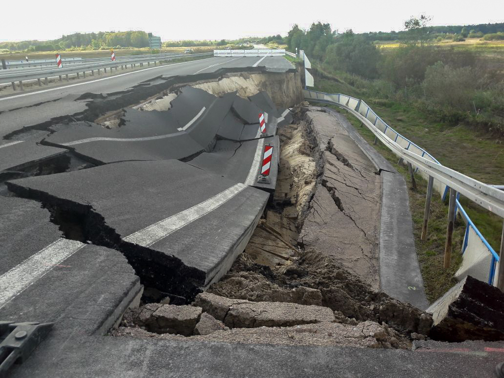 Fahrbahnversackung auf einem Teilstück der Bundesautobahn 20 nahe der Trebeltalbrücke bei Tribsees